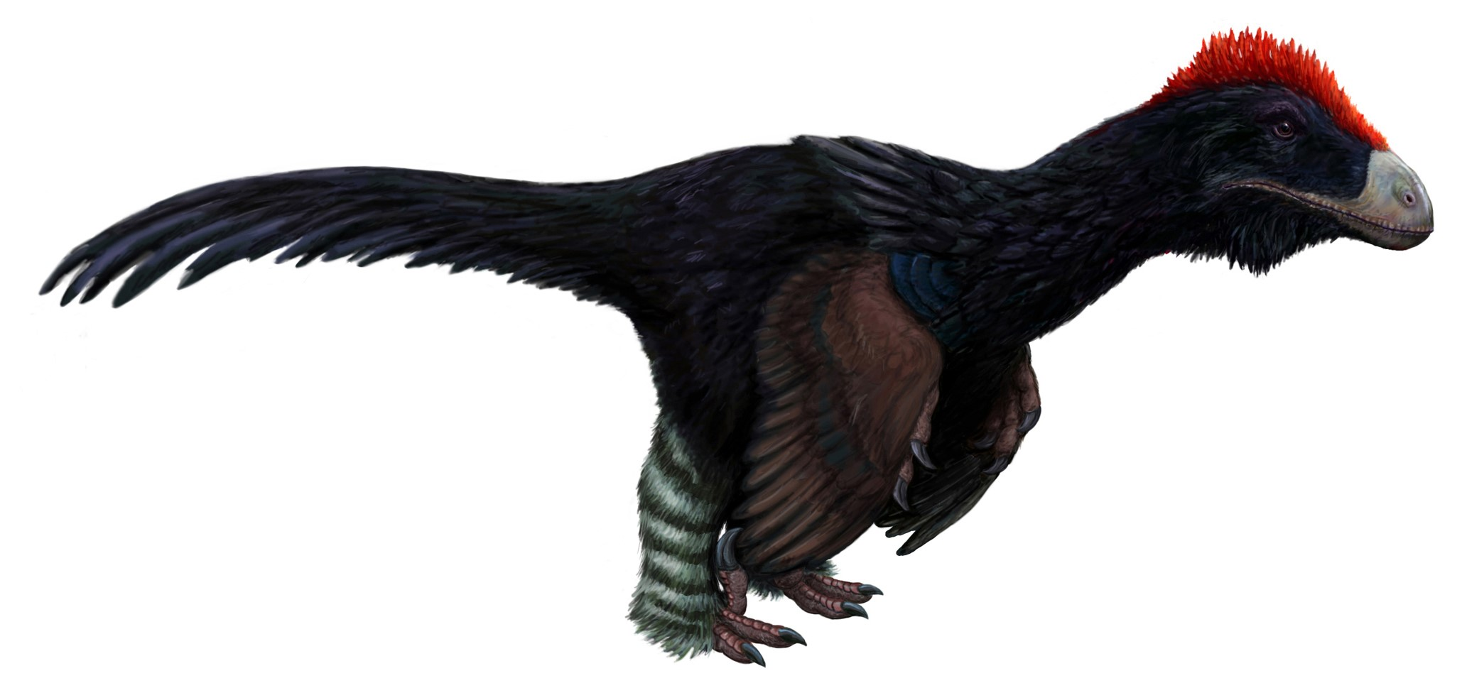 Atrociraptor marshalli.